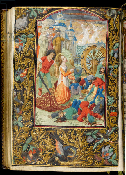 Master of Fitzwilliam 268, Book of hours; circa 1475